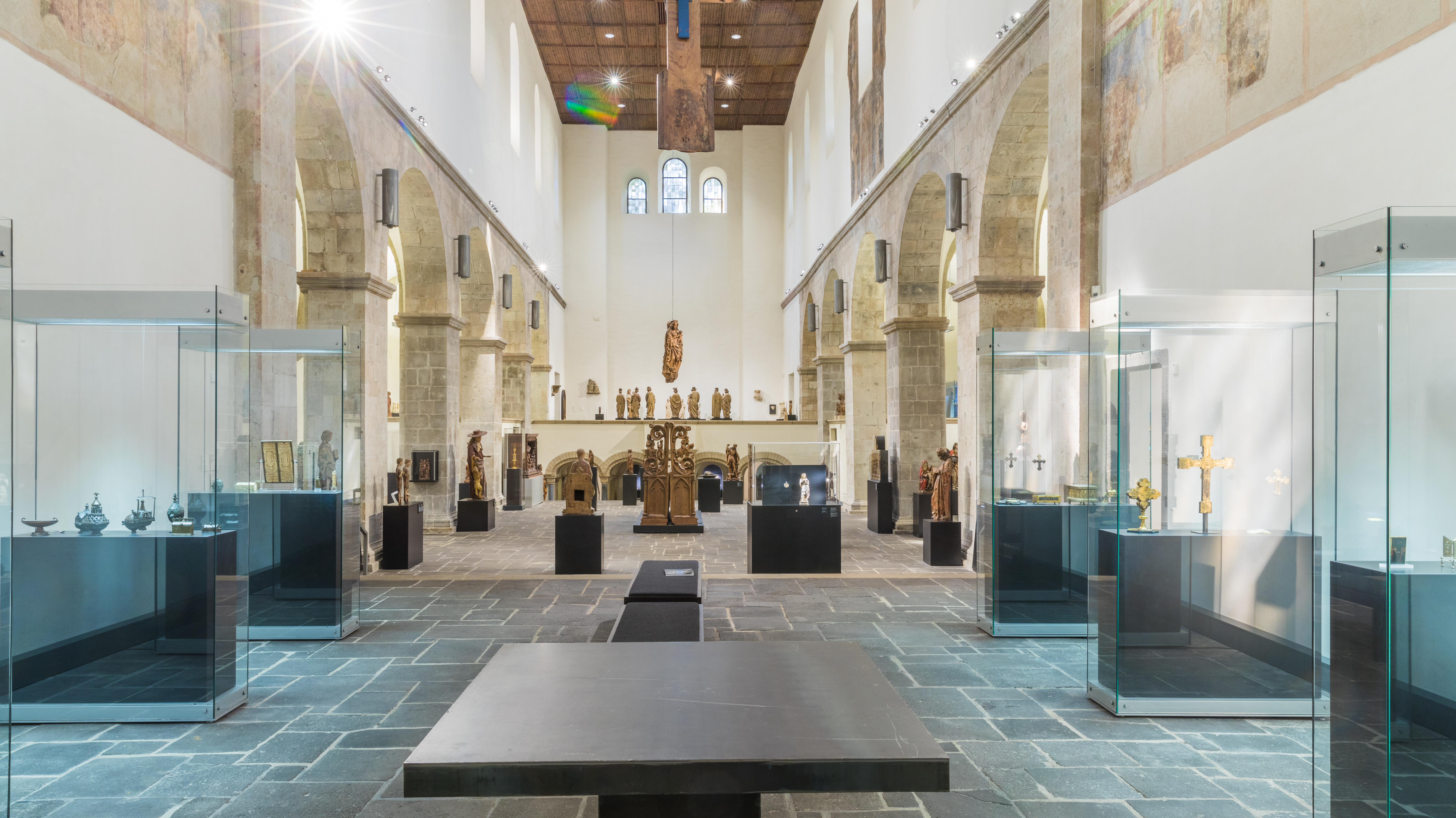 Museum Schnütgen, Köln - Innen